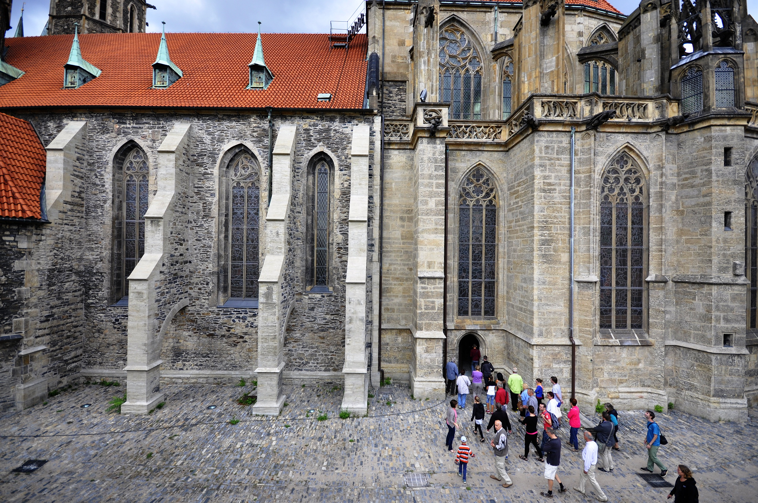 Kostel svatého Bartoloměje, Brandlova, Kolín I, Kolín.